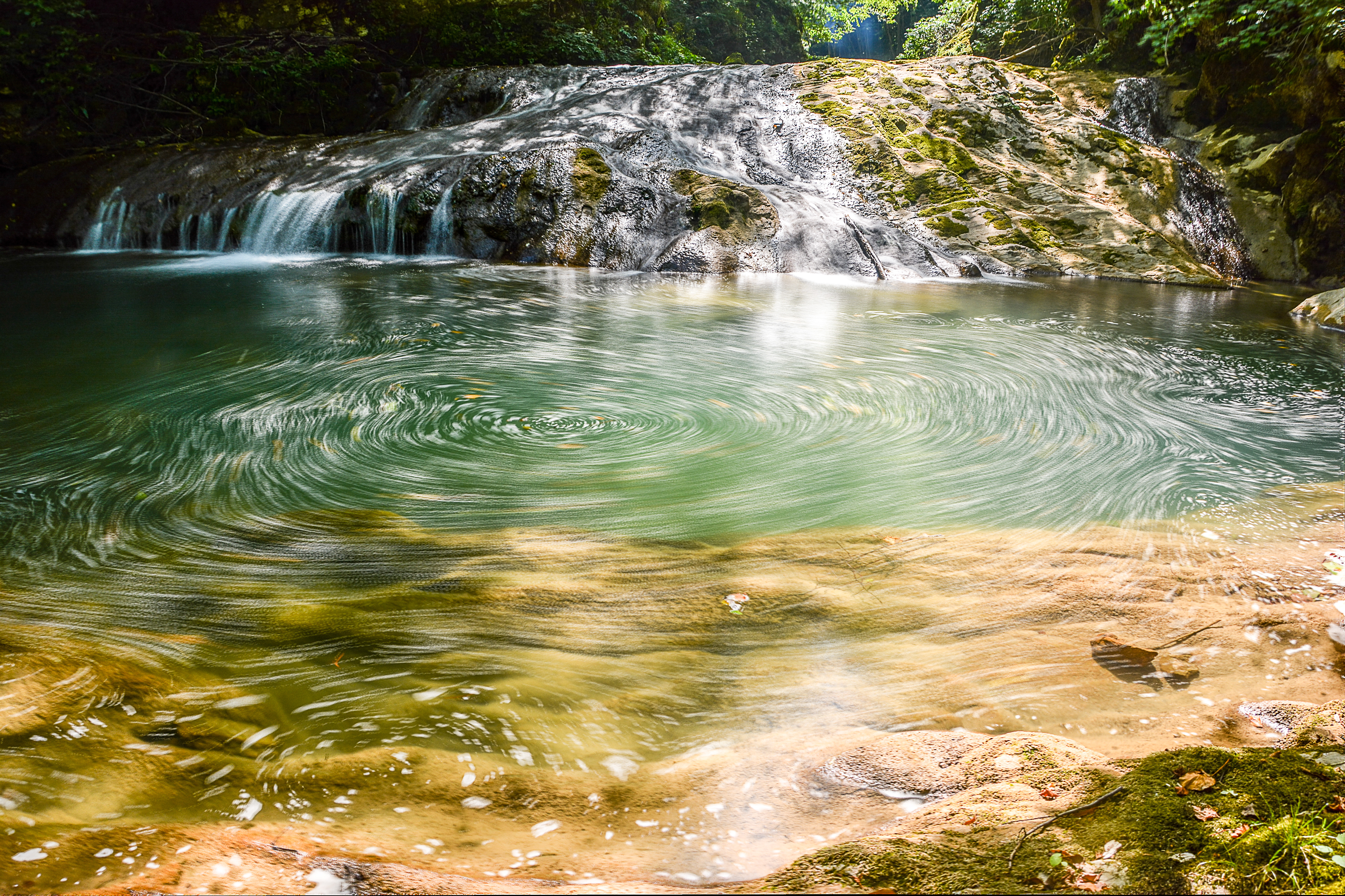 Посебни резерват природе Кањон Цврцке Кнежево, Котор Варош ID добра: PPRP001